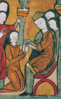 The Countess of Bearn swears homage to Alfonso II of Aragon, promising not to marry without his consent